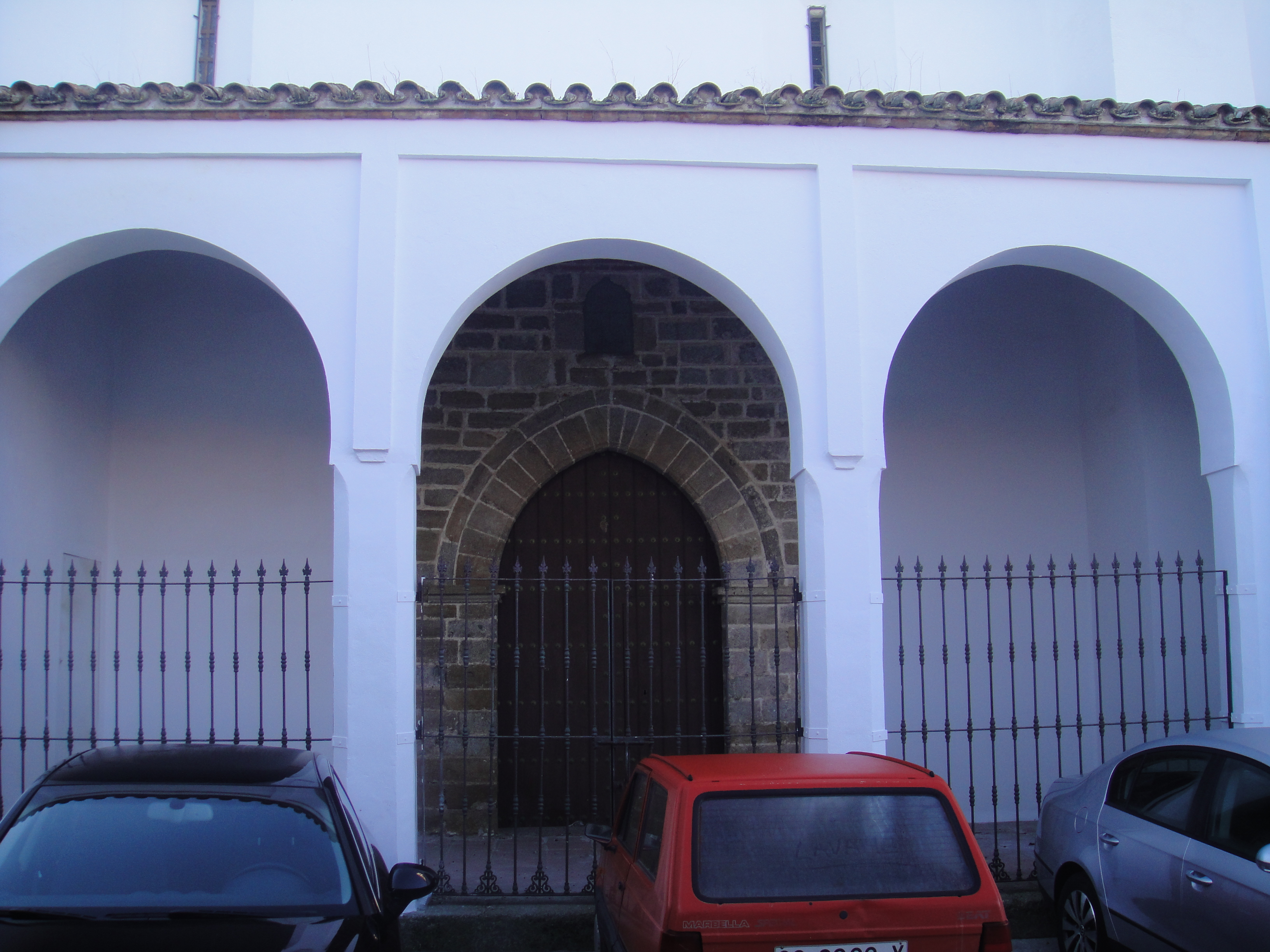 Portada del lado del Evangelio de la iglesia de Nuestra Señora del Castillo de Fuente Obejuna, provincia de Córdoba, (España).